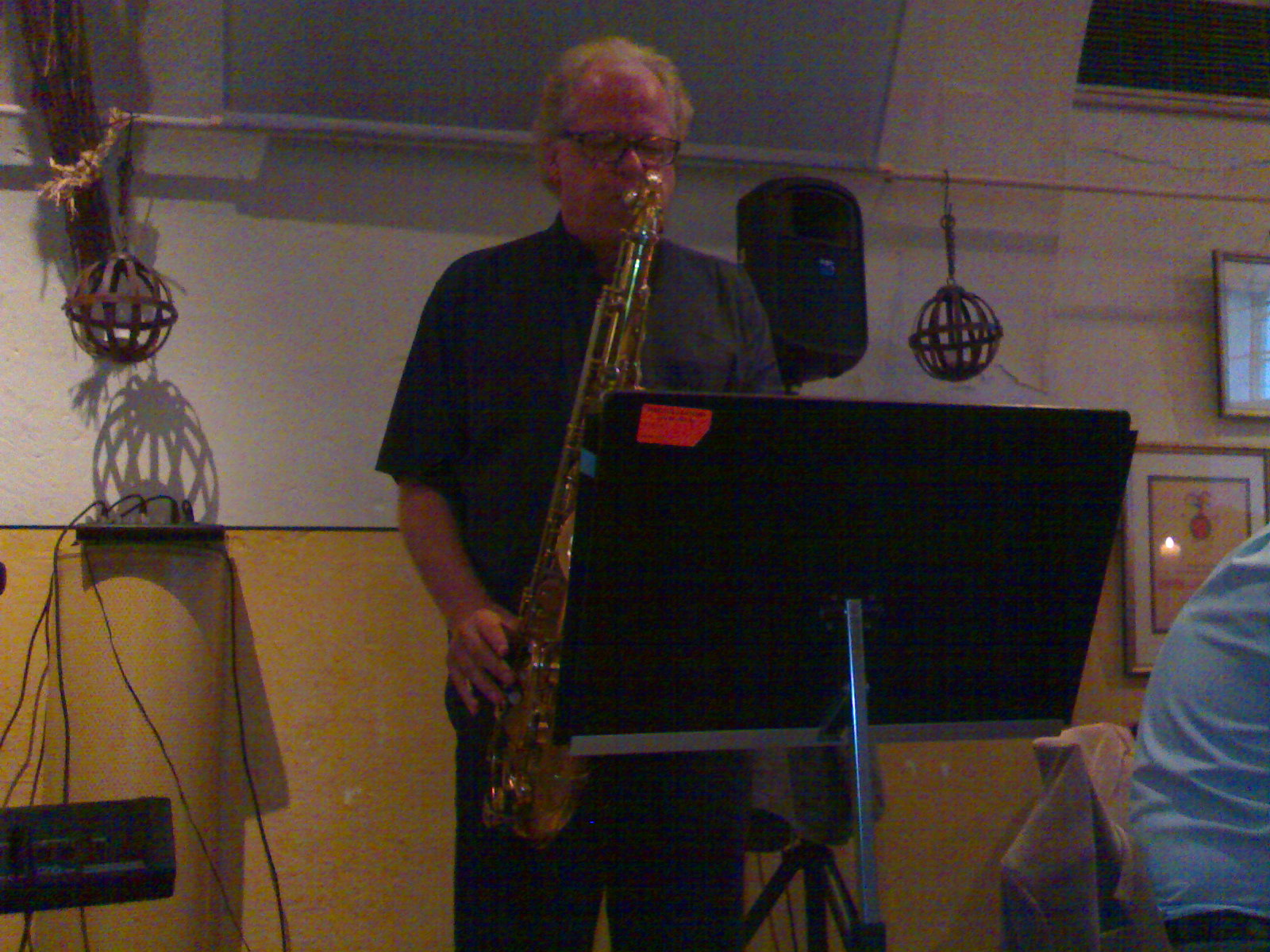 Sax solo by Eero Koivistoinen.